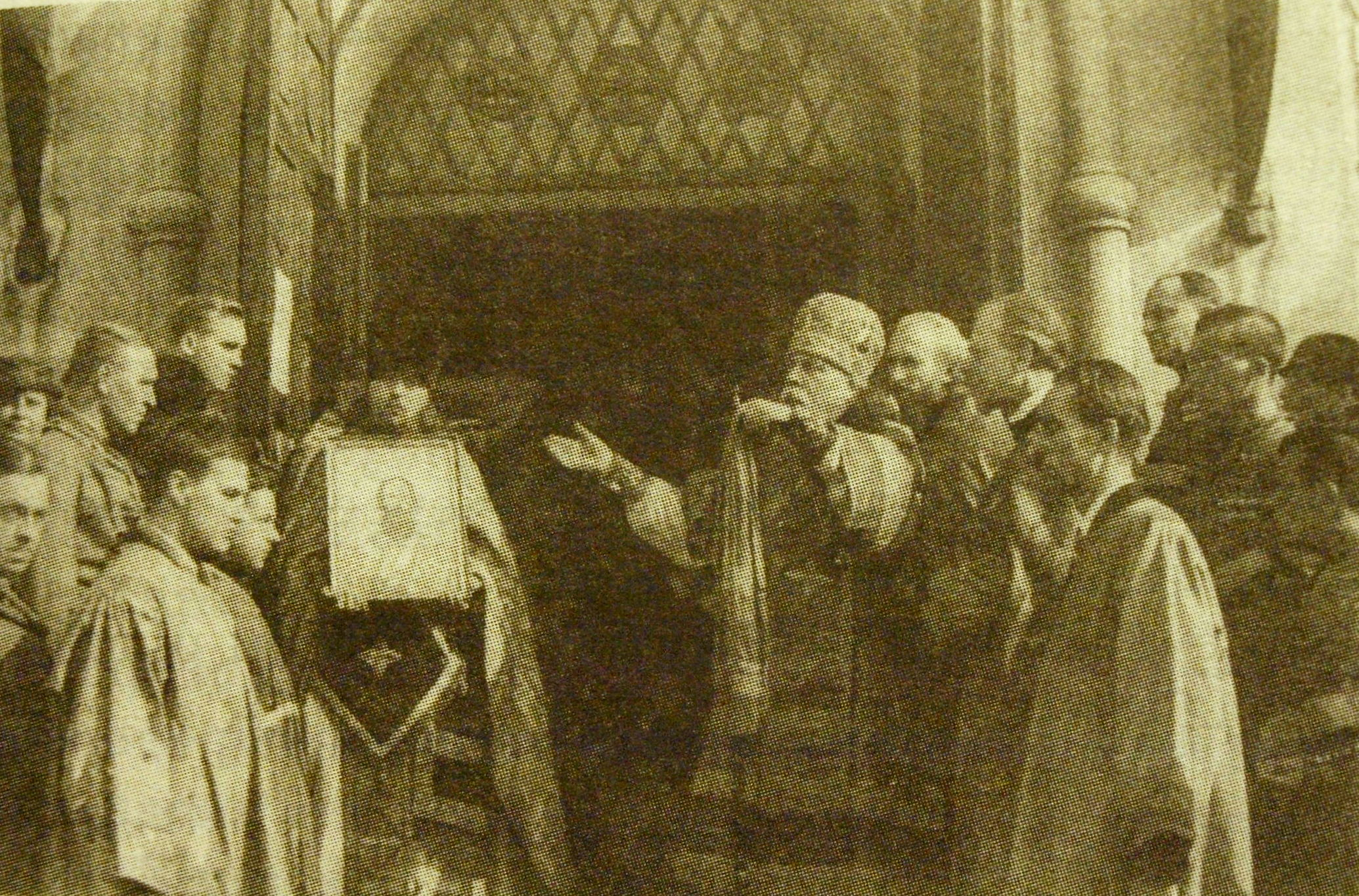 Biskup Sergij a Isaakij